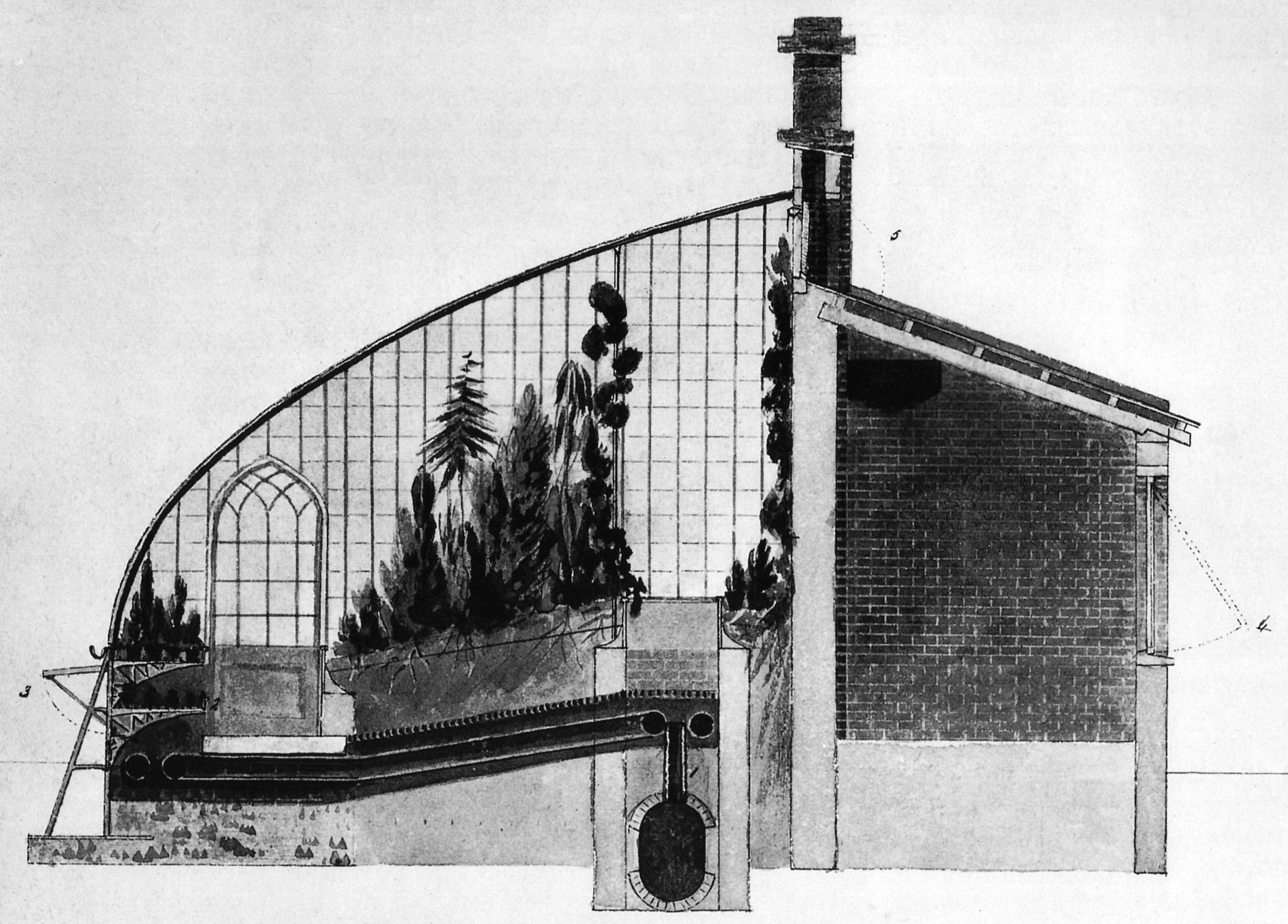 Gewächshausentwurf von John Claudius Loudon, 1818 von Joseph Sabine von der (Royal) Horticultural Society in Auftrag gegeben.